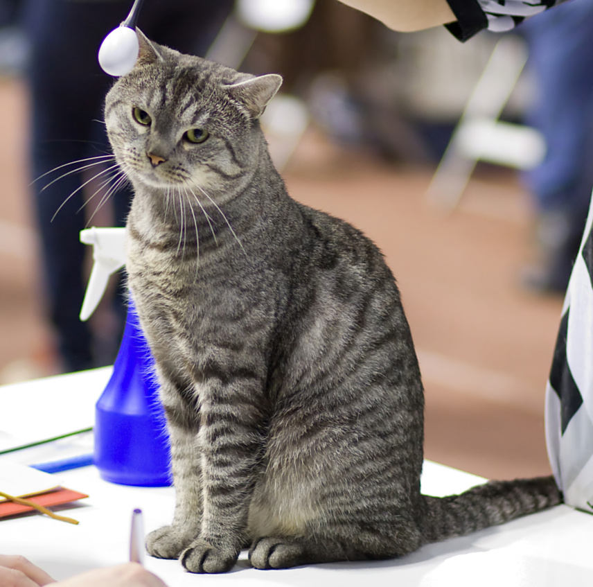 European shorthair à l'exposition féline de Tampere EC Untuvan Isin Poika (Poju) [EUR ns 23] male KM